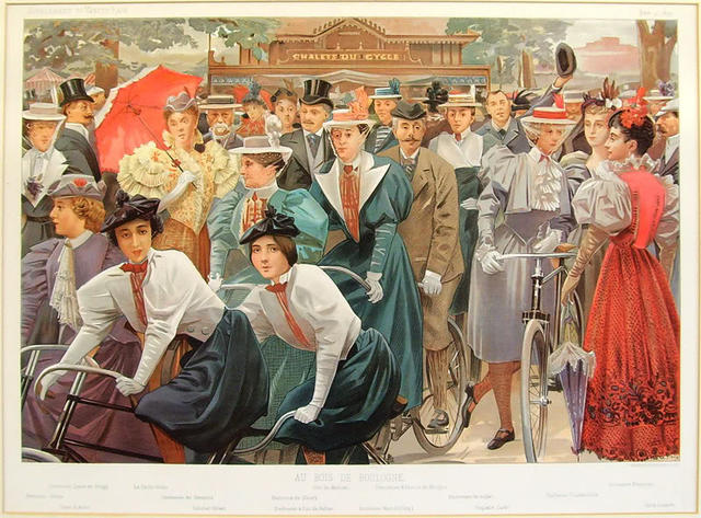 Caricature : "Au Bois De Boulogne (Aux Chalets du Cycle)". Group of lady cyclists, including Princess Brancovan, Liane de Pougy, La Belle Otero, the Duchess of Doudeauville, the Duke of Broglie, and Ernest Coquelin. Les Chalets du Cycle était situé sur l'allée du Bord de l'eau, entre l'étang de Suresnes et la Seine. Zoomable version from the National Portrait Gallery, allows legend to be read